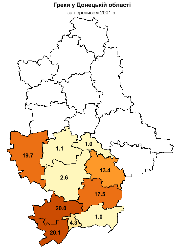 Розселення греків у районах (разом з містами) Донецької області за переписом 2001 р. / Greeks in Donetsk oblast, 2001 census